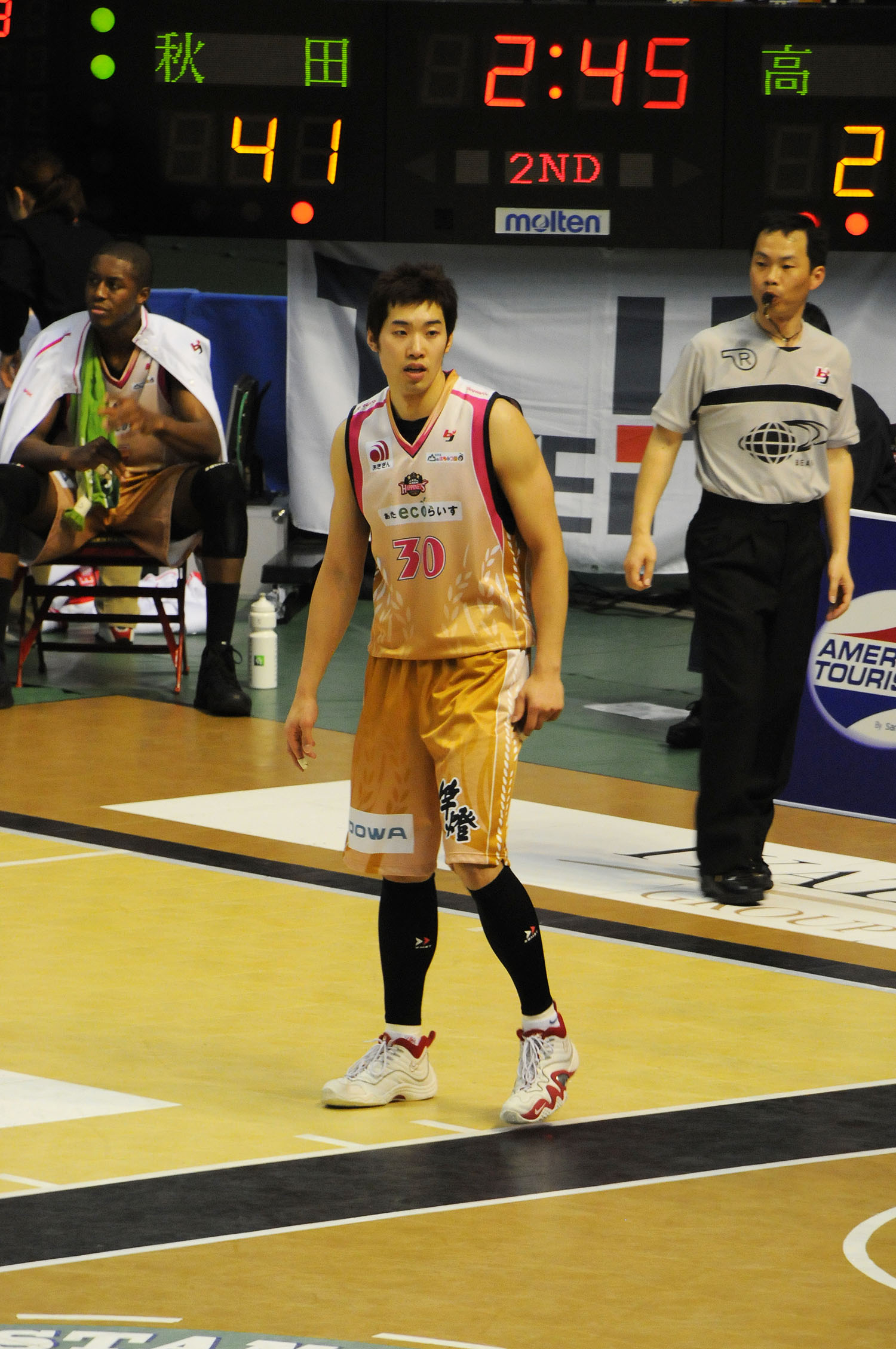 秋田ノーザンハピネッツ、ジョン・セヨン選手。秋田市立体育館で。